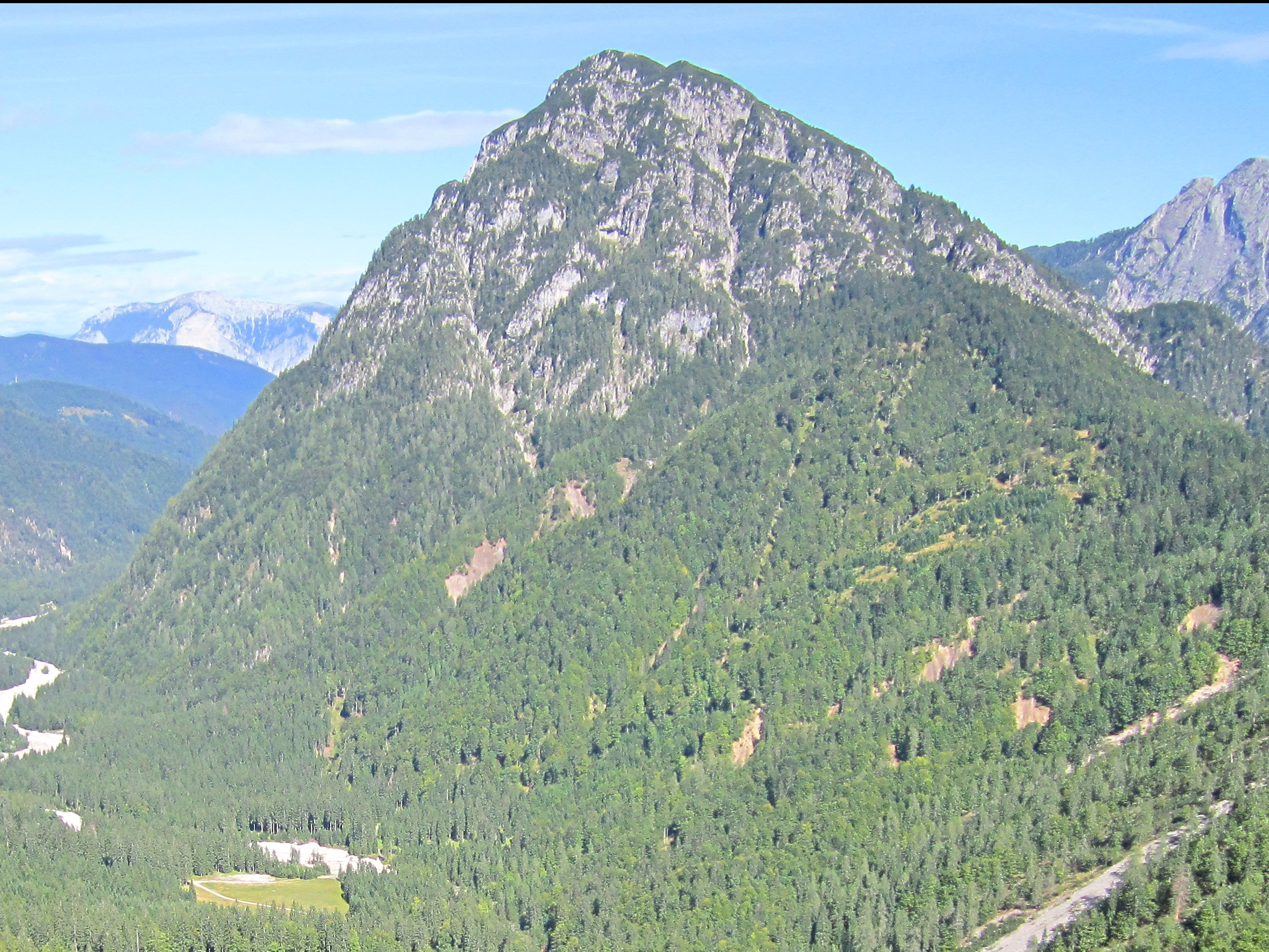 Il Monte Re visto da Carnizza di Riofreddo